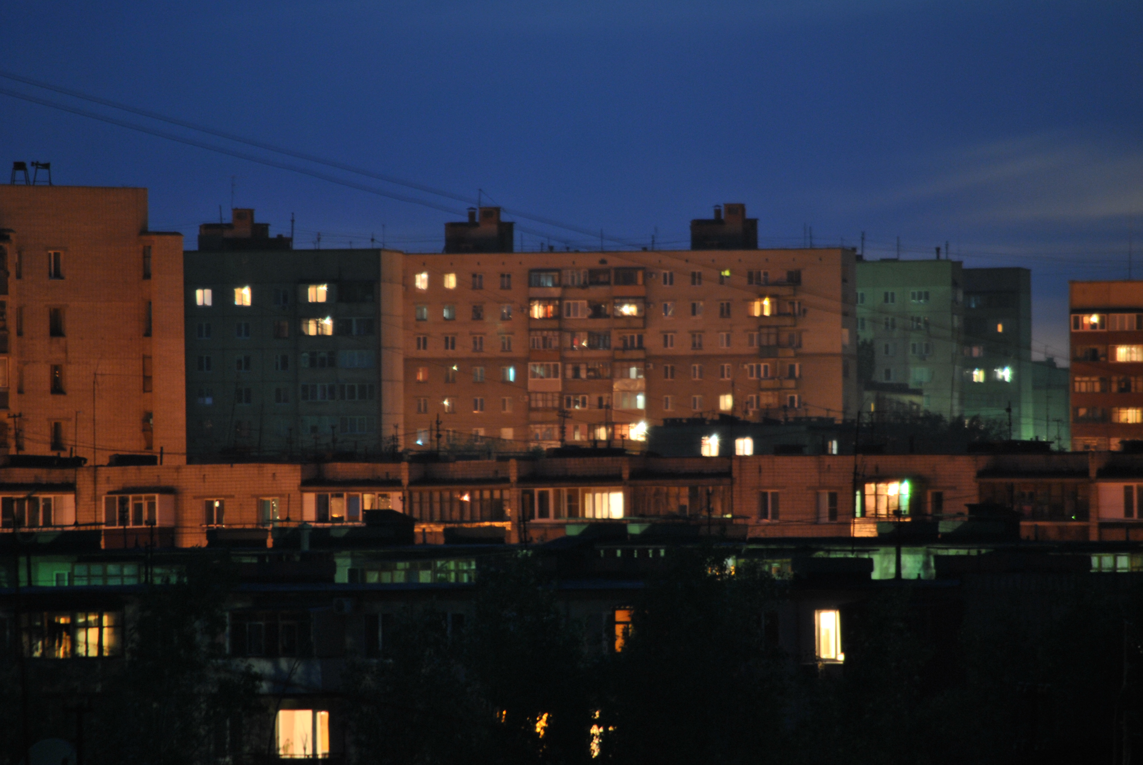 Novotroitsk, Orenburg Oblast, Russia